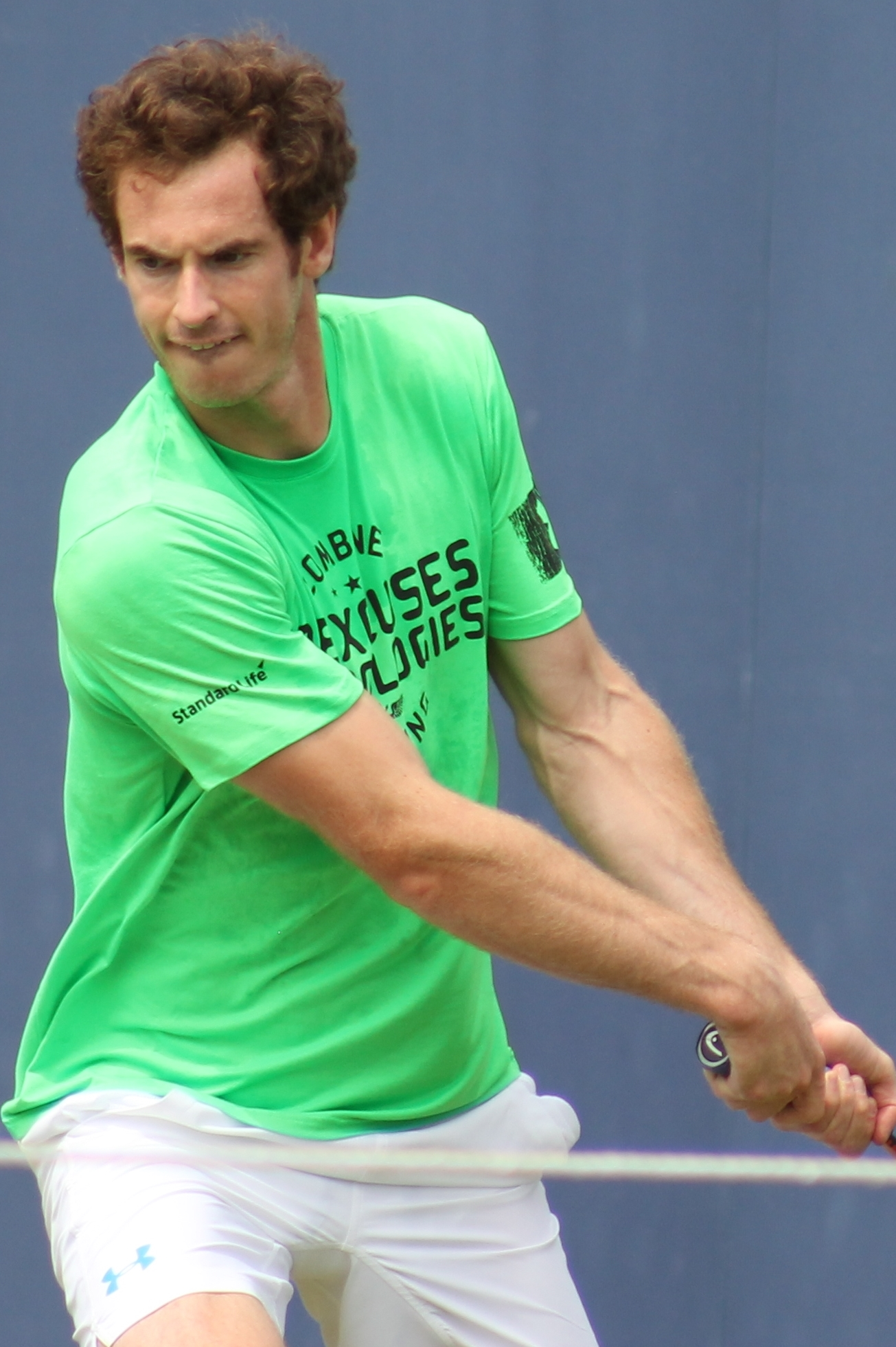 Murray A. QC15 (36)